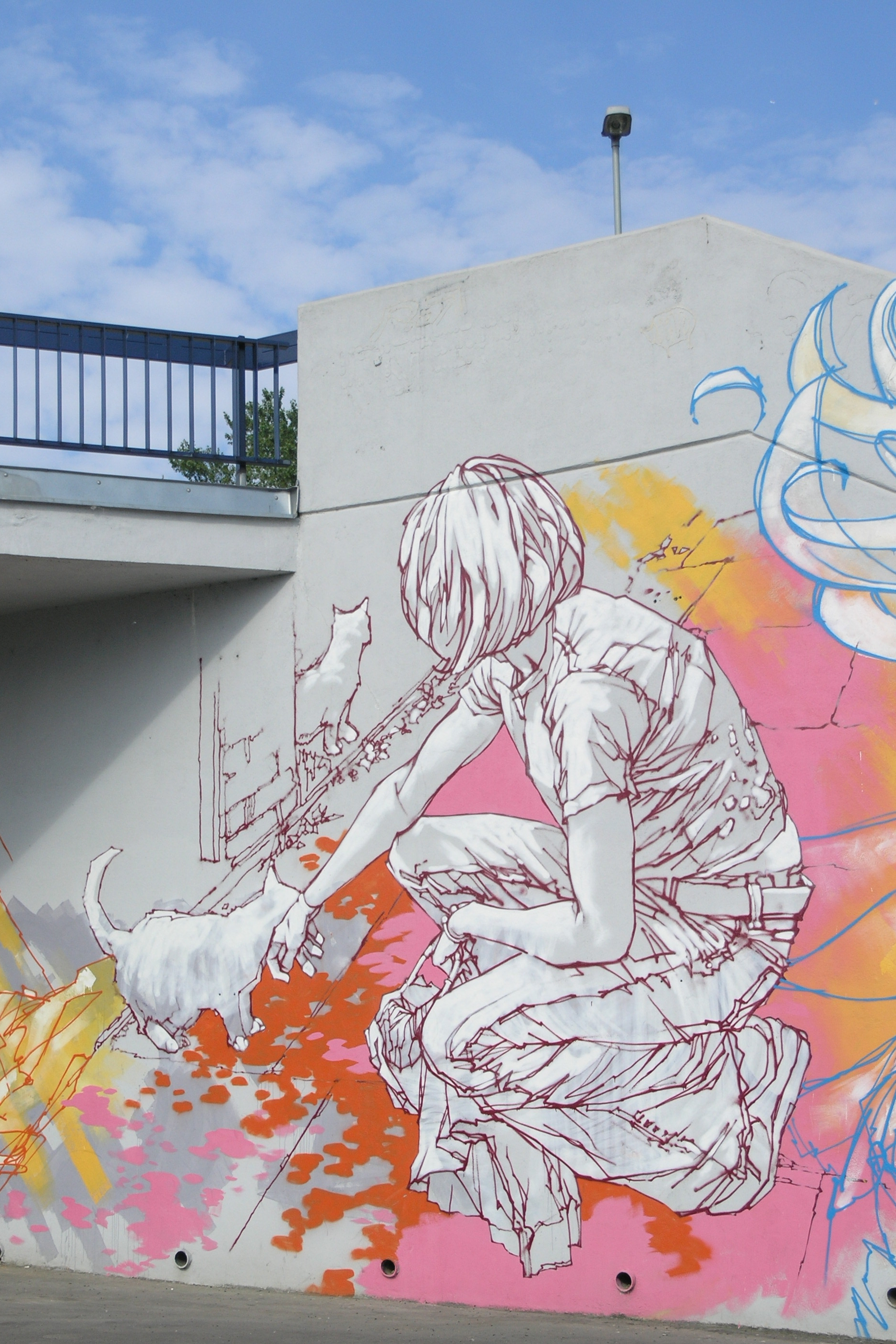 Praha, Holešovice - Grafitti od Mode 2 z Velké Británie, vytvořené v rámci Names Fest 2008 (metro Vltavská)